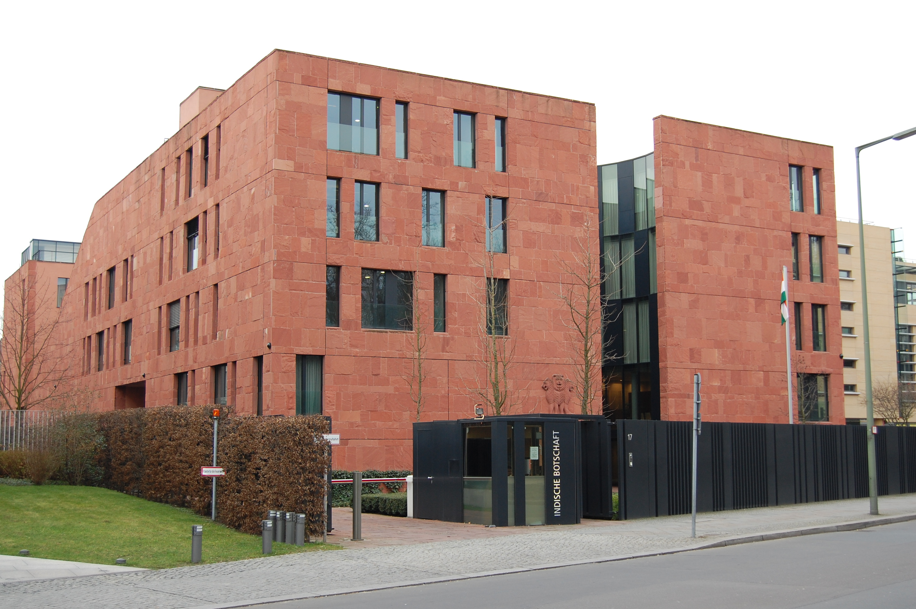 Indian Embassy in Berlin